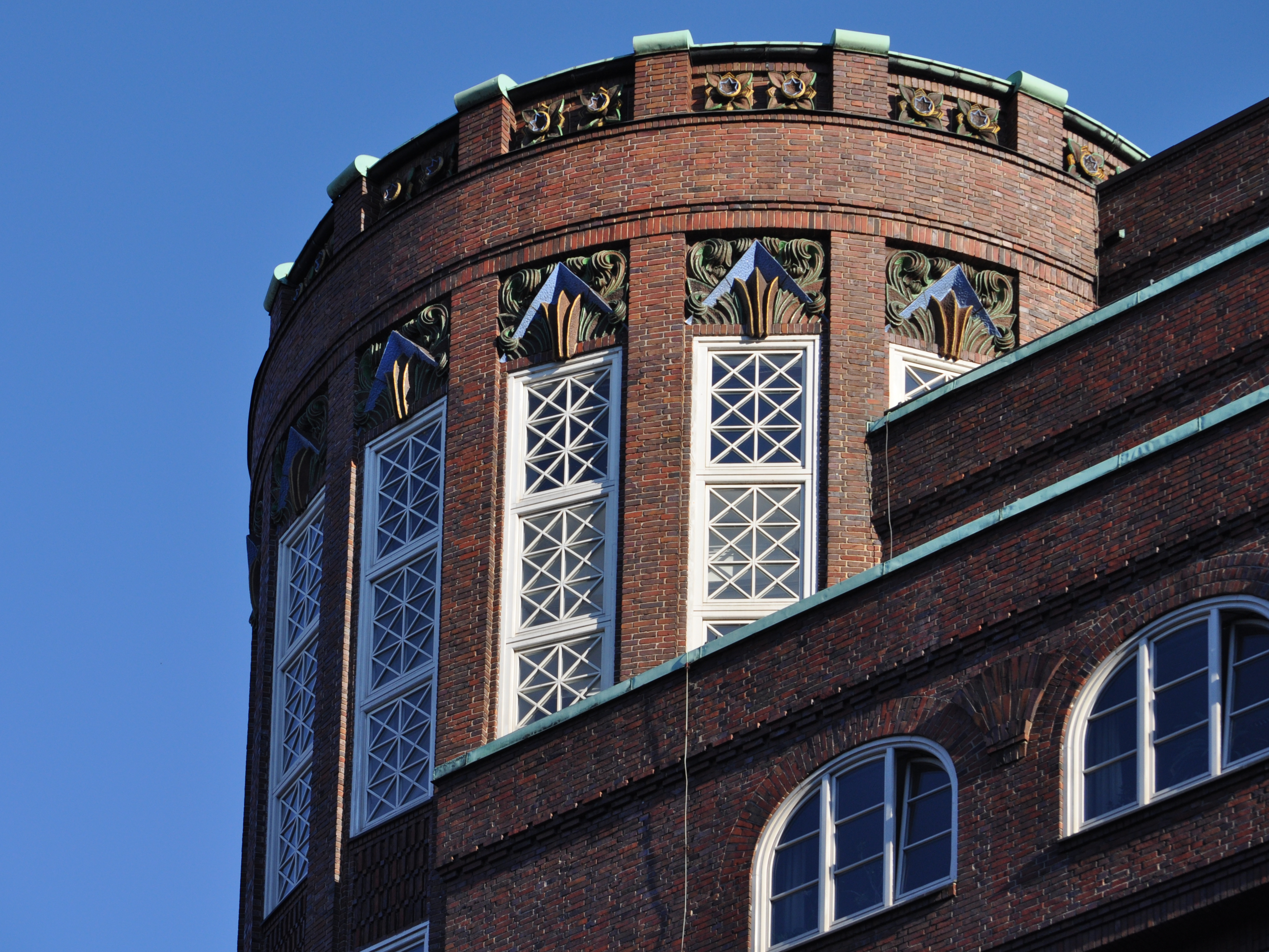 Fassadendetail der Hamburger Finanzbehörde, Fassadenschmuck von Richard Kuöhl. This is a photograph of an architectural monument.